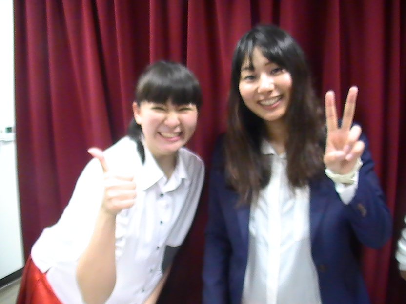 左：れおてぃ 右：さち